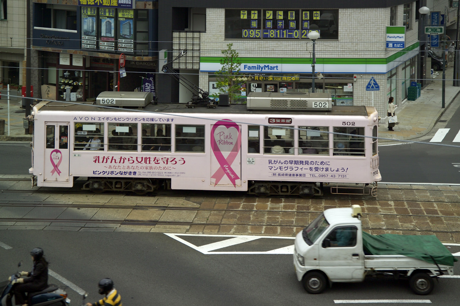 Trolley car of Nagasaki Electric Tramway, Nagasaki, Nagasaki, Japan